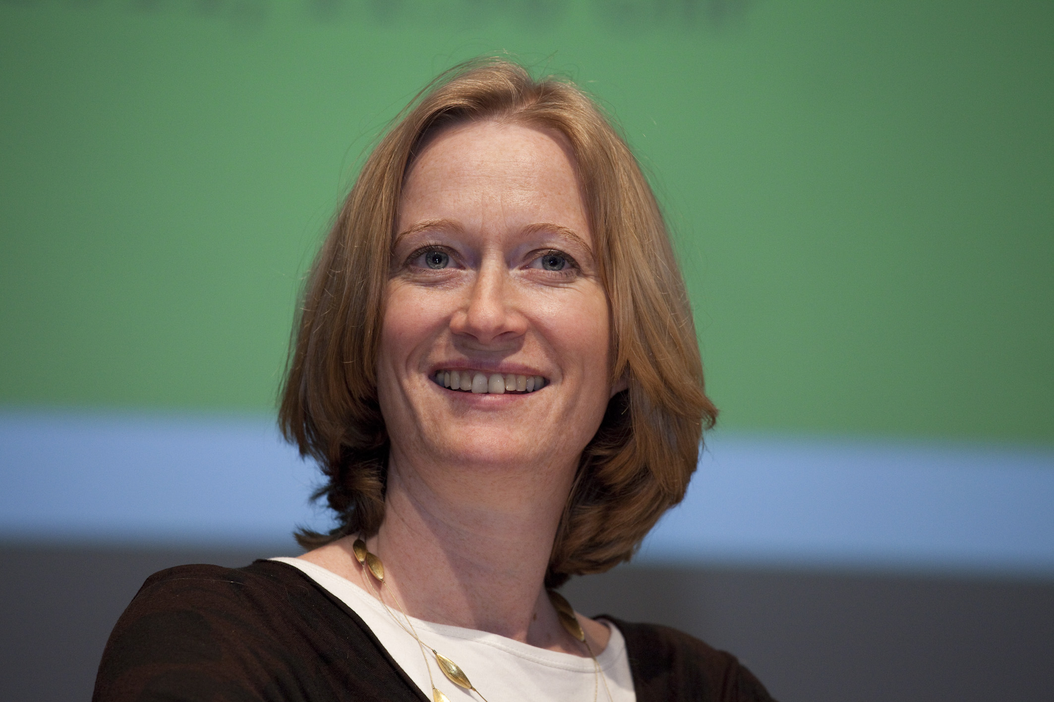 Kerstin Andreae, MdB Bündnis 90/ Die Grünen